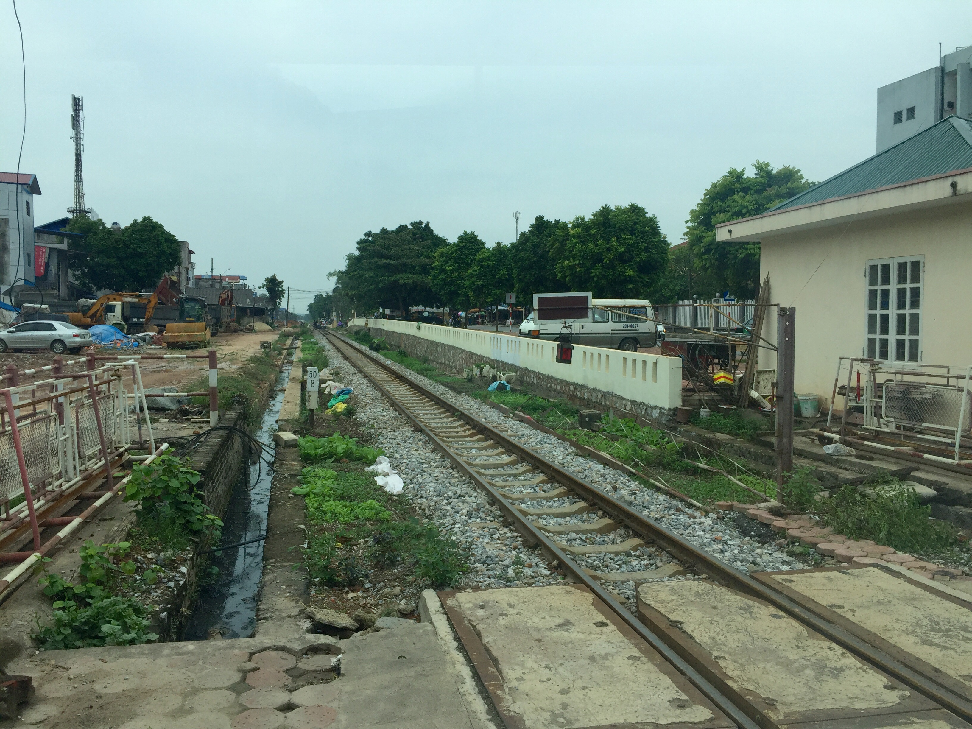 Ga Thai nguyen, phuong quang trung, tp Thainguyen, Việt Nam!